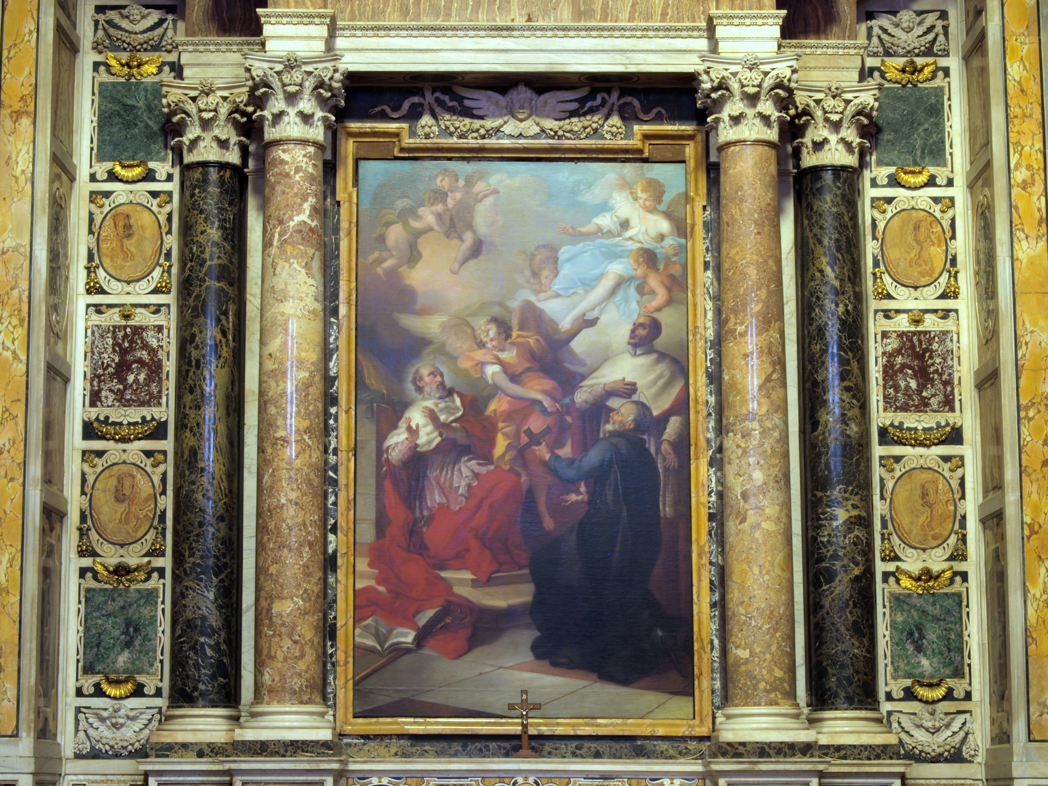 La pala d'altare è di Francesco Manno (1754-1831).